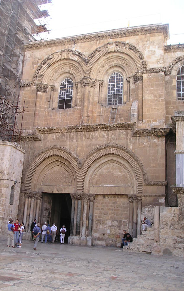 Вход в Храм Гроба Господня в Иерусалиме